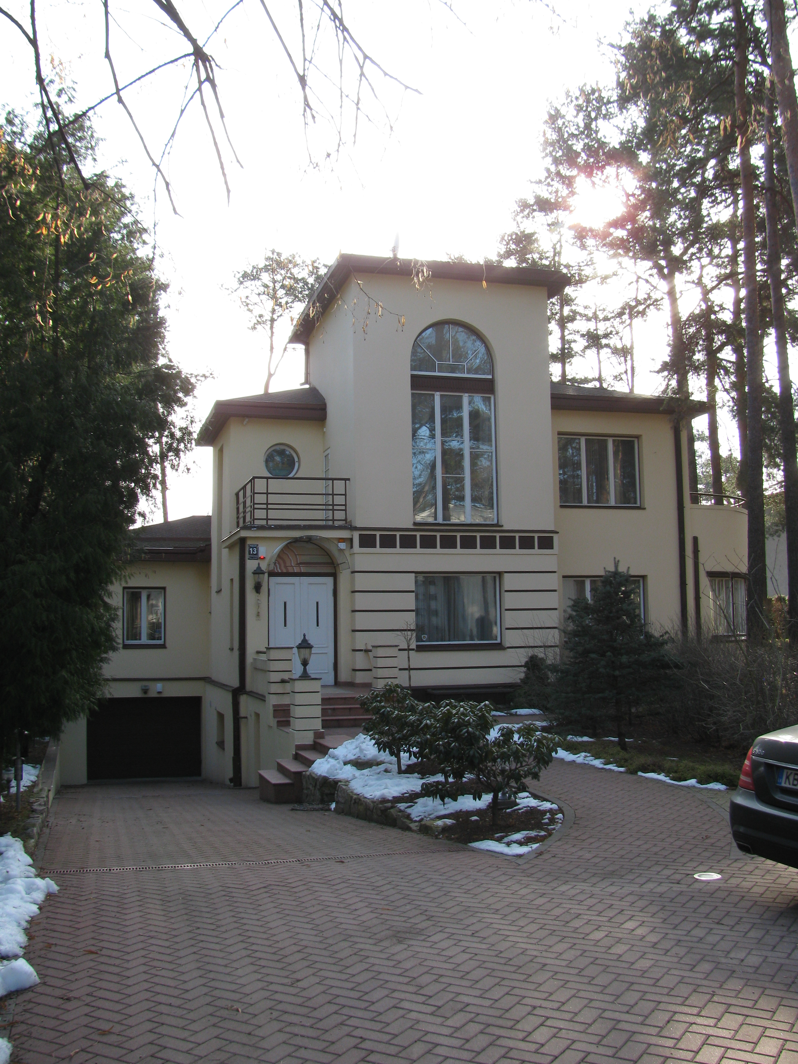 Savrupmāja, Ziemeļu rajons, Poruka iela 13